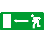 stato italiano, normativa italiana, percorso/uscita di emergenza, pubblico dominio